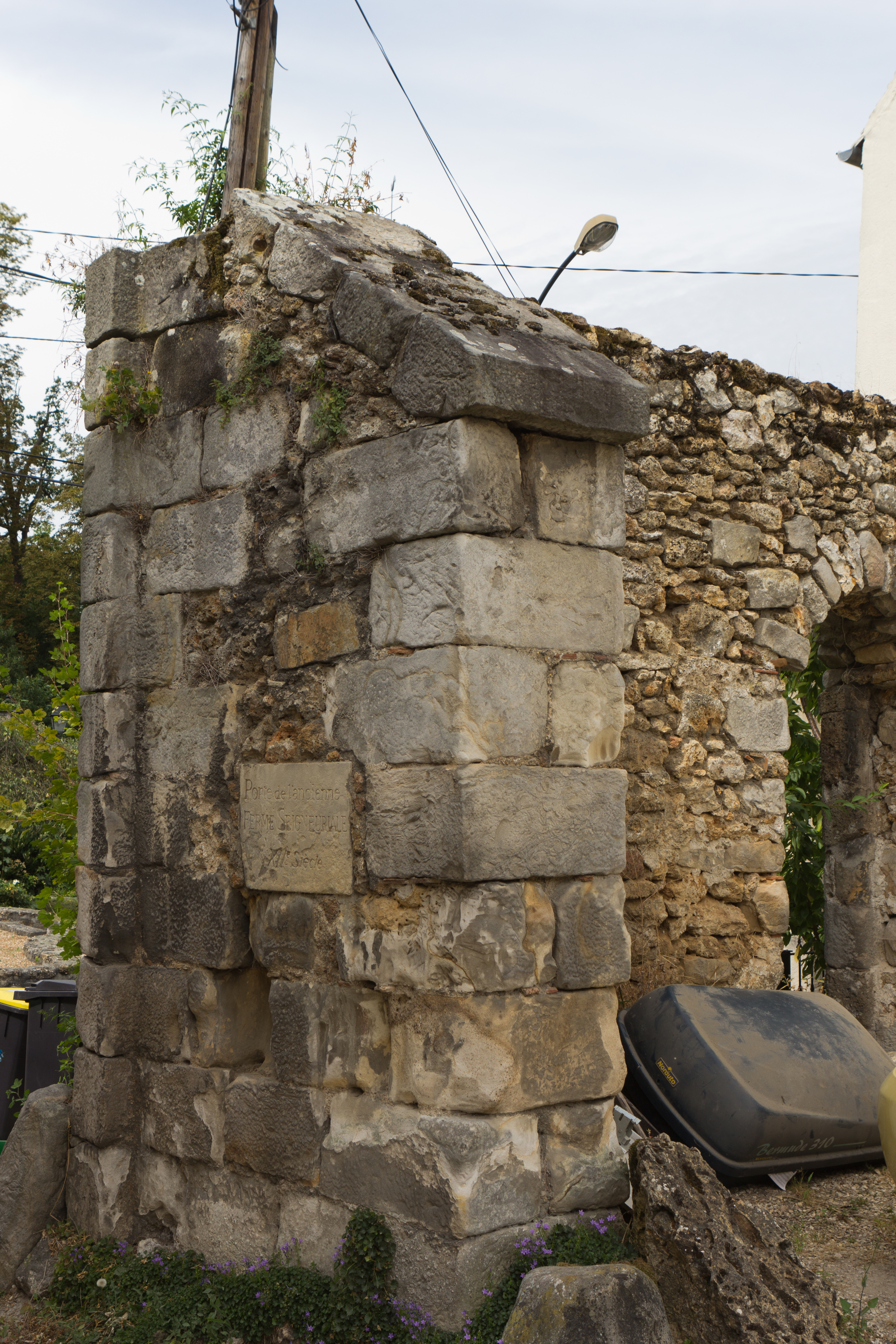 Porte de l’ancienne ferme des seigneurs de Villemoisson. Commune de Villemoisson-sur-Orge, département de l'Essonne. France